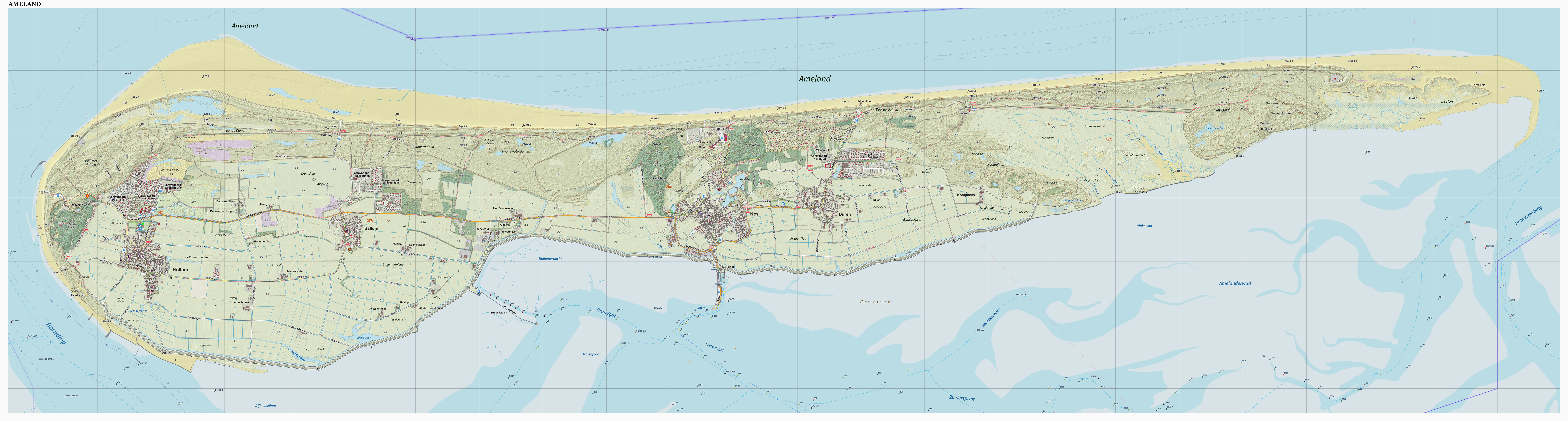 Topografische kaart van Ameland. Resolutie: 400 pixels/km. Samengesteld door Jan-Willem van Aalst op basis van de GML open geodata van de BRT/Top10NL (basisregistratie Topografie, Kadaster), vrijgegeven door Kadaster onder de Creative Commons BY licentie. Additionele gegevens uit BAG uit de Open Street Map en uit de Risicokaart. Zie ook de Legenda.